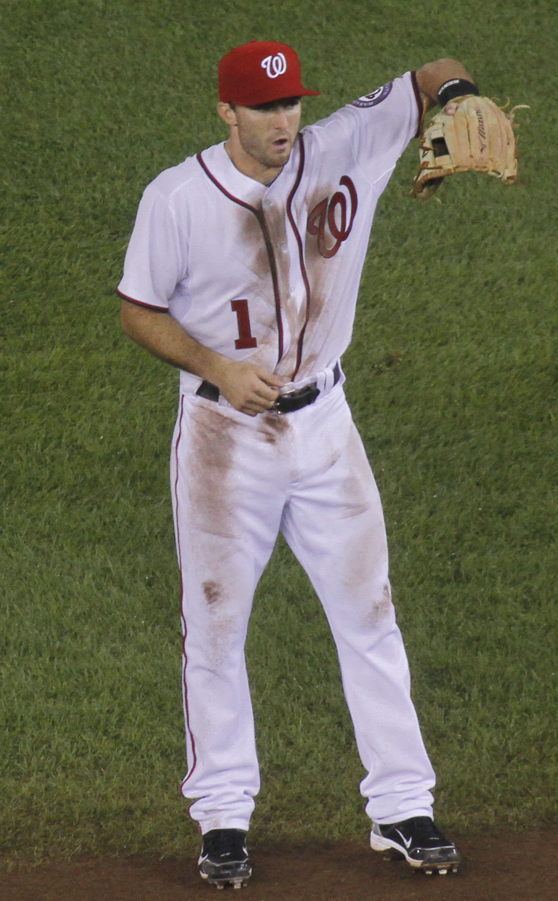 Steve Lombardozzi, Jr.